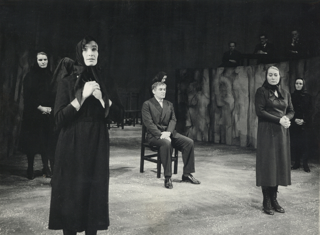 Miha Remec, Delavnica oblakov, Drama SNG v Ljubljani. Na fotografiji: Helena Erjavec (Emilija), Ivanka Mežan (Dominika), Bert Sotlar (Drejc Rutar), Štefka Drolc (Marija), Vida Levstik (Karla).